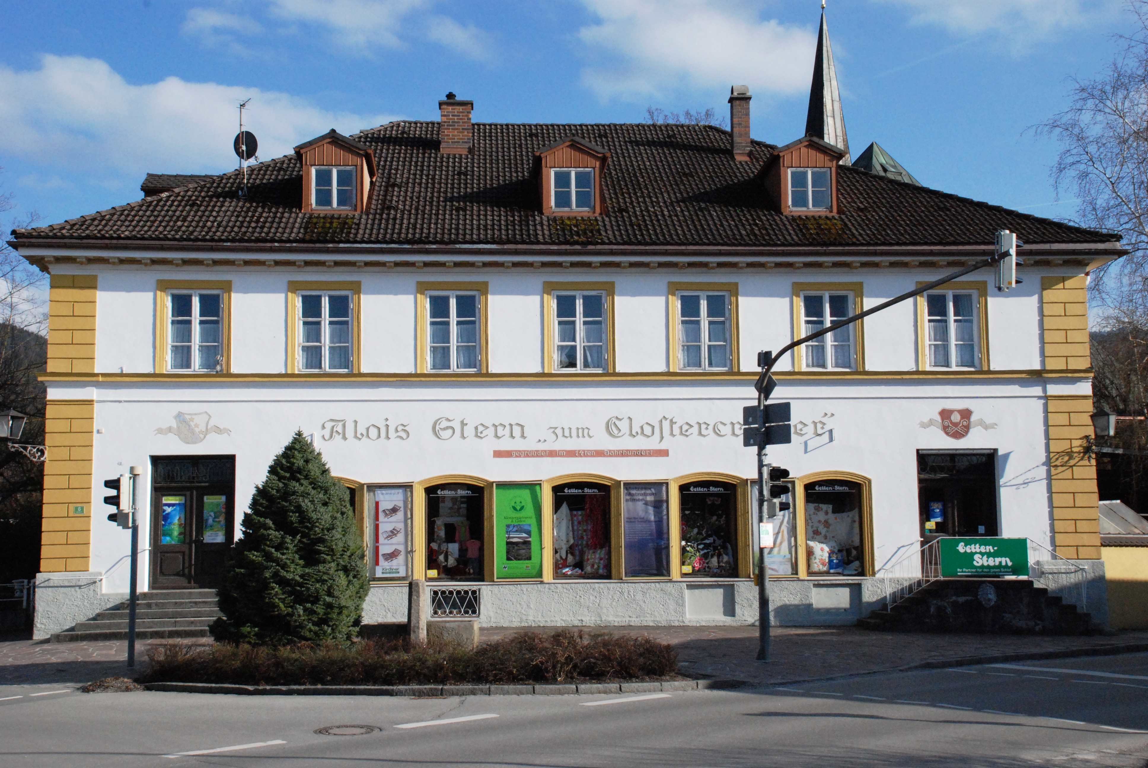 Geschäftshaus am Dorfplatz 8 in Benediktbeuern, Landkreis Bad Tölz-Wolfratshausen, Regierungsbezirk Oberbayern, Bayern. Als Baudenkmal unter Aktennummer D-1-73-113-15 in der Bayerischen Denkmalliste aufgeführt.